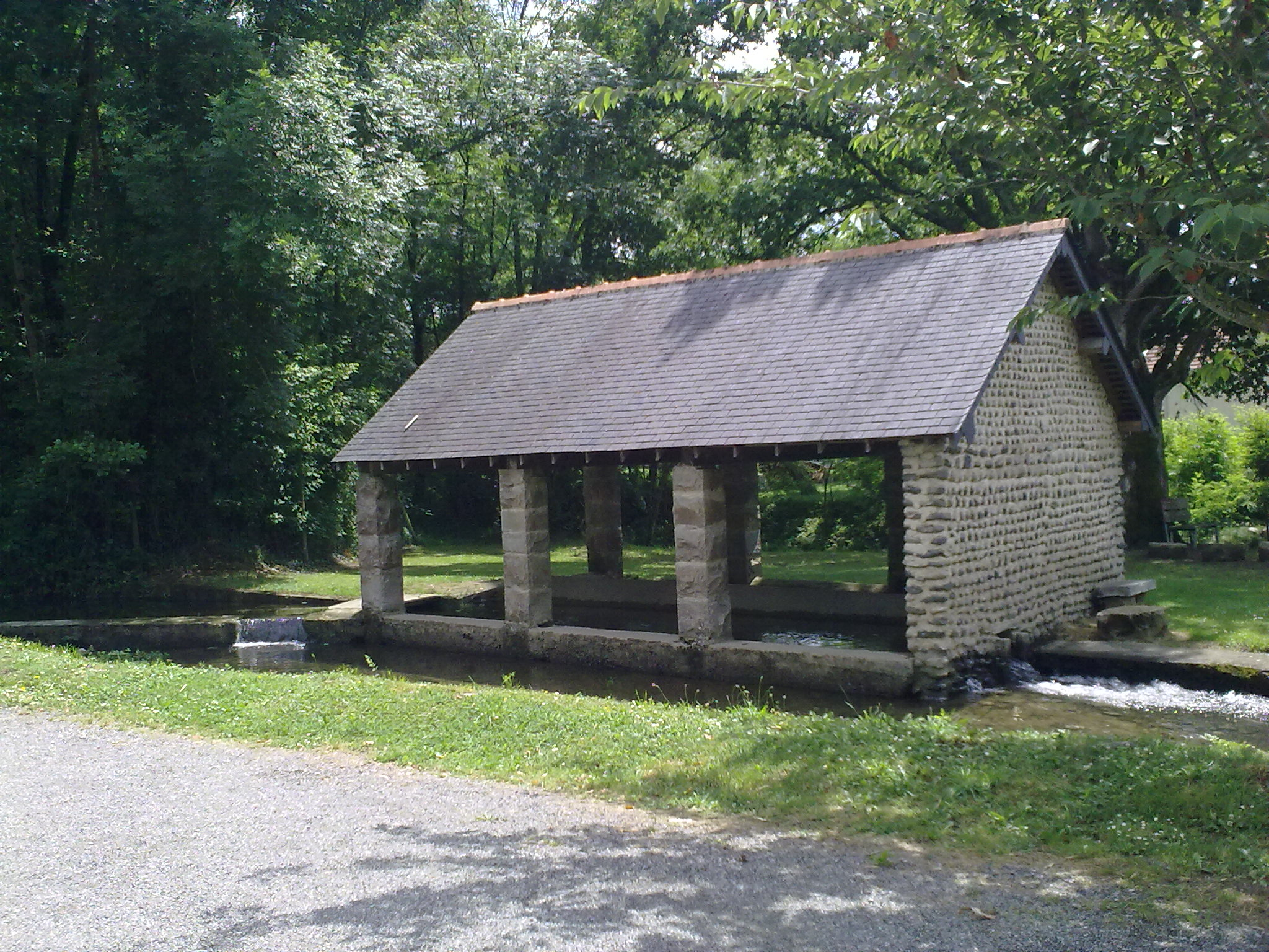 Nousty le 13 juin 2010.